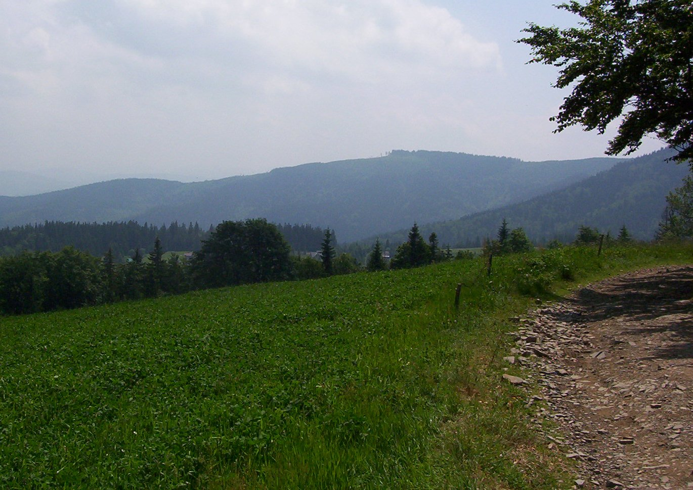 Widok na szczyt Kiczor (szczyt) z Cieślara (z prawej strony zbocze Stożka Wielkiego) - panorama. Autor: Michał Miłek